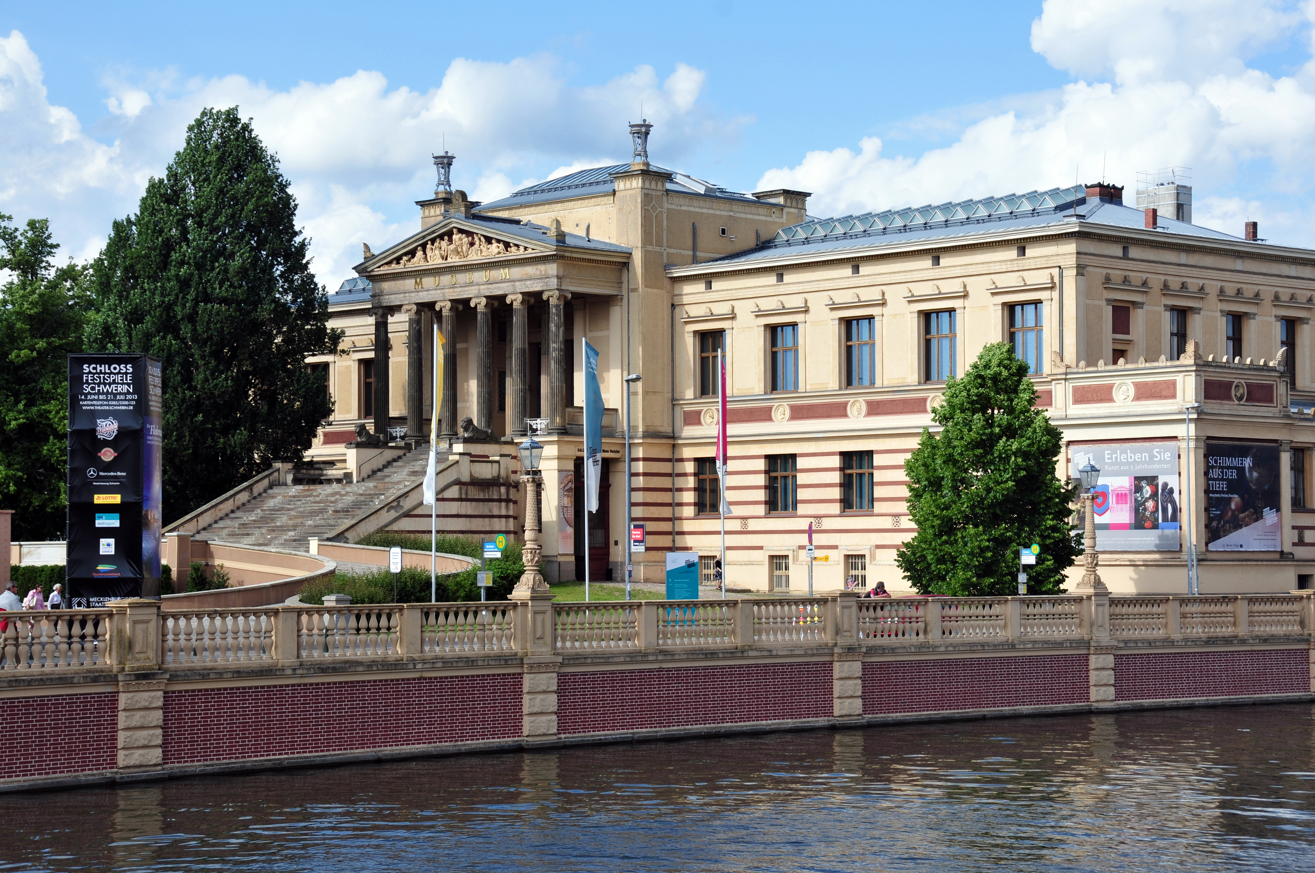 Schwerin; mit 50mm Brennweite von der Orangerie zum Bahnhof und das Theater Schwerin